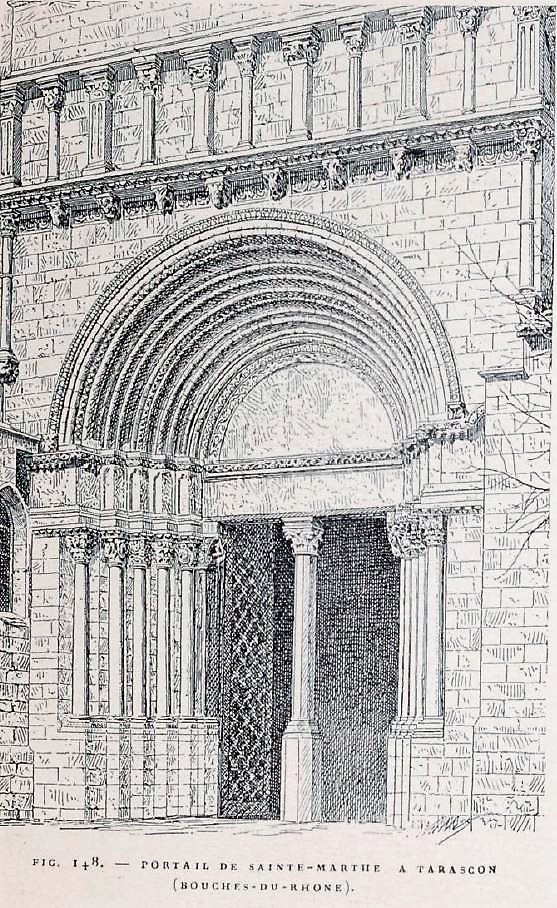 Eglise Sainte-Marthe de Tarascon , le portail par Corroyer, Édouard (1835-1904) in l'architecture romane 1888